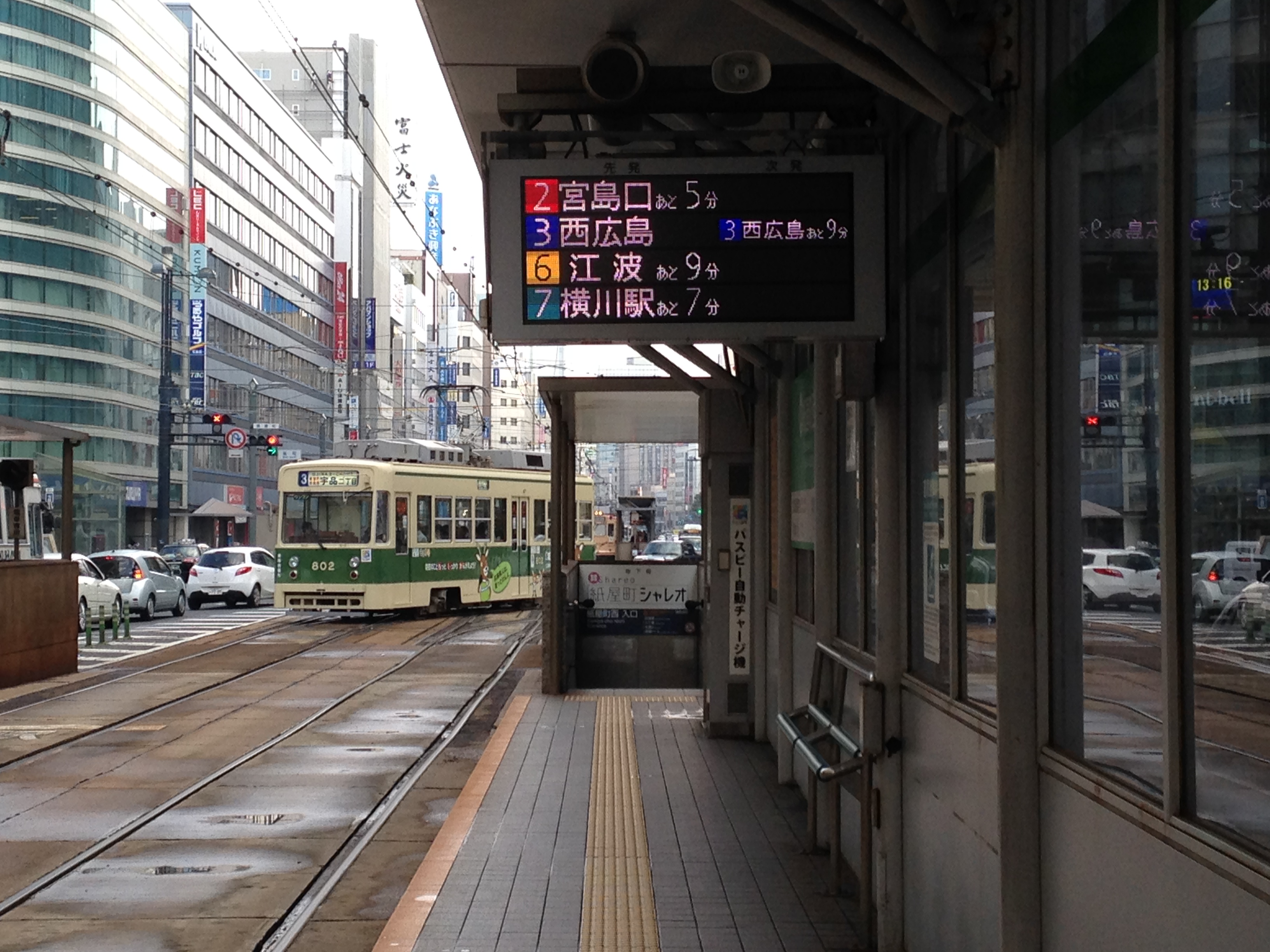 紙屋町西停留場のホーム